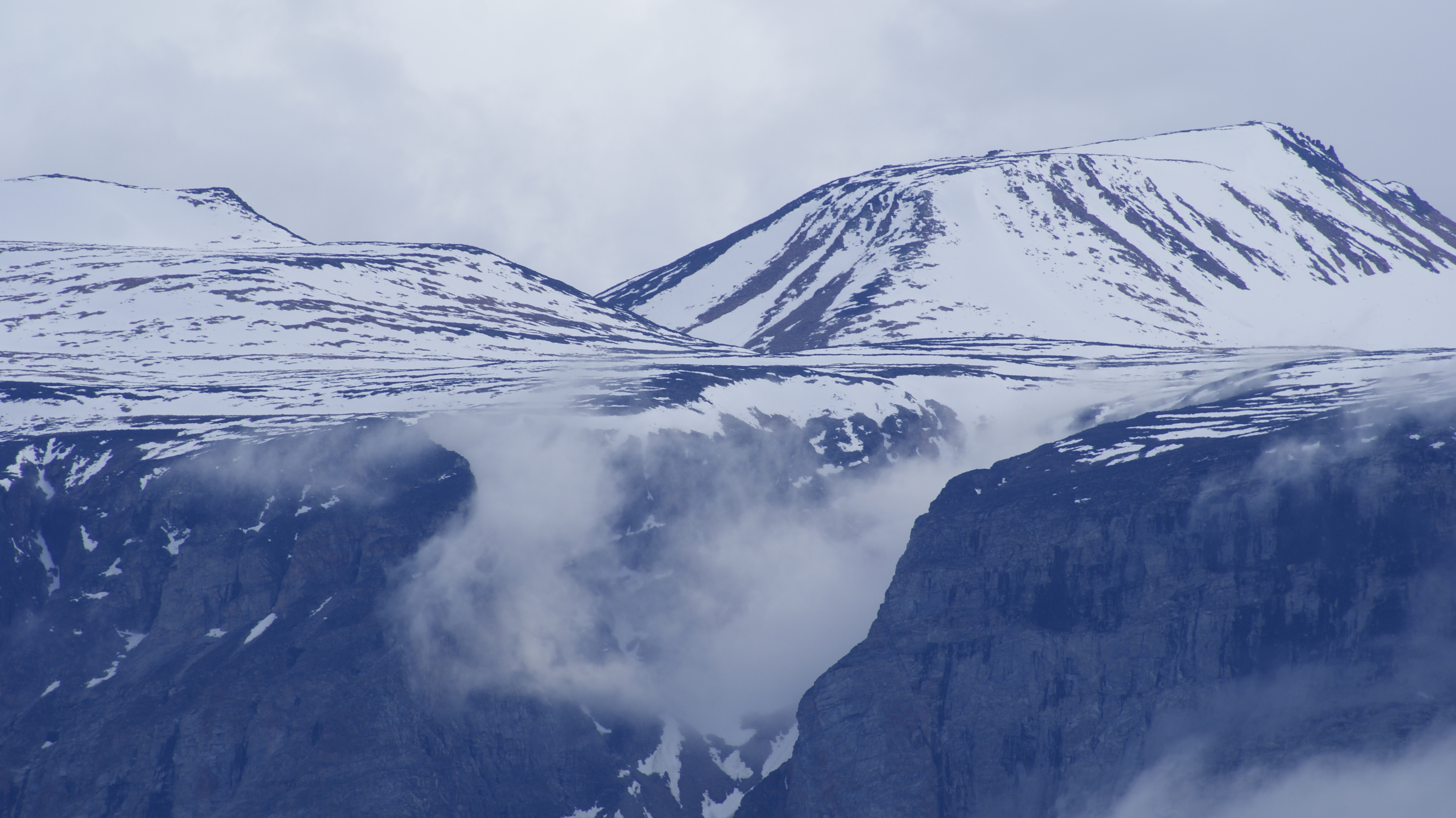 Nuussuaq Peninsula, Greenland, seen from Uummannaq.